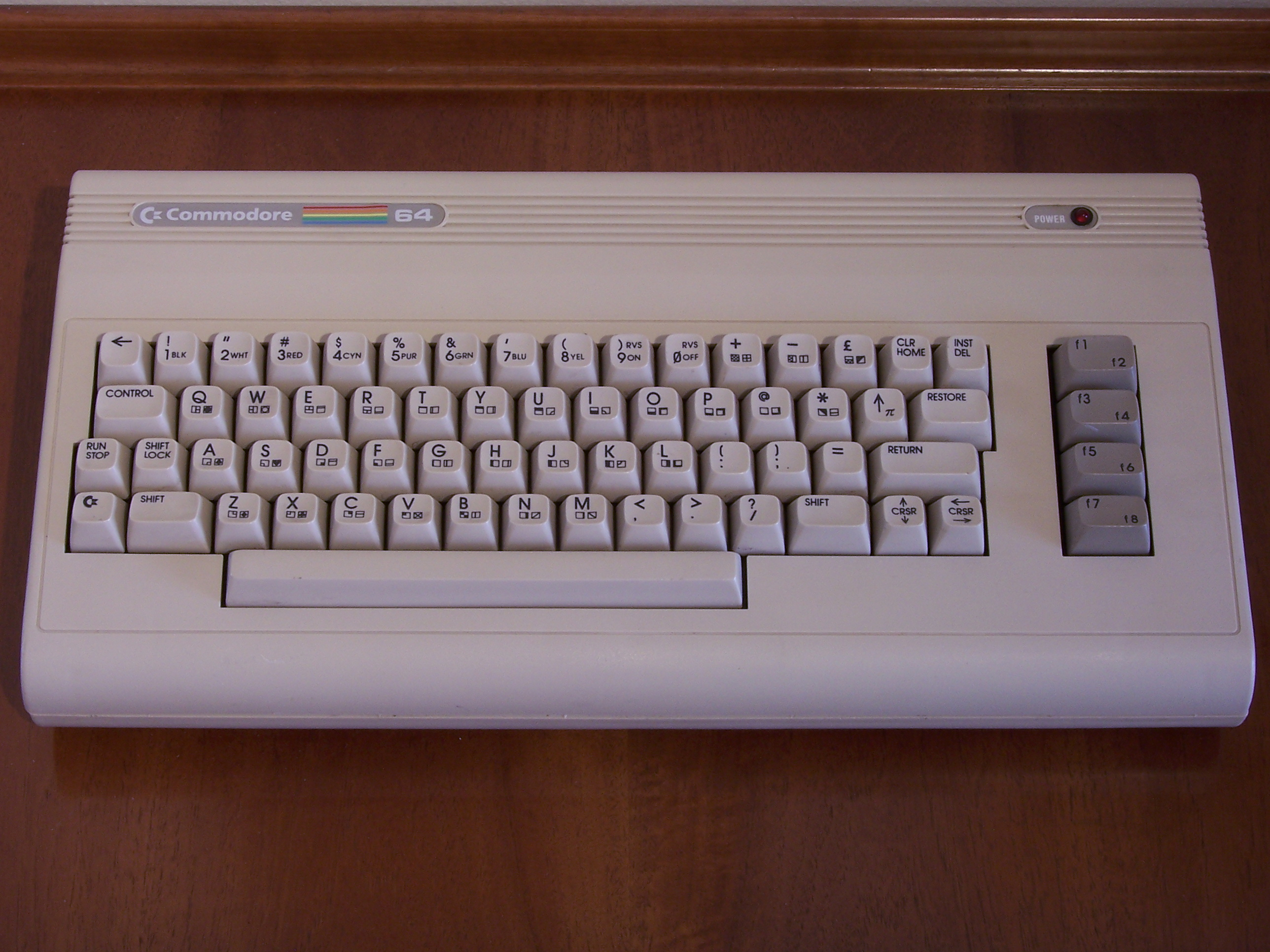 Autore: Matteo Caccia Fonte: collezione privata Descrizione: Commodore 64 G - 1989 - Made in Germany Autirizzo l'uso in Wikipedia secondo la licenza indicata.